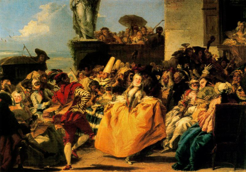 Escena de Carnaval